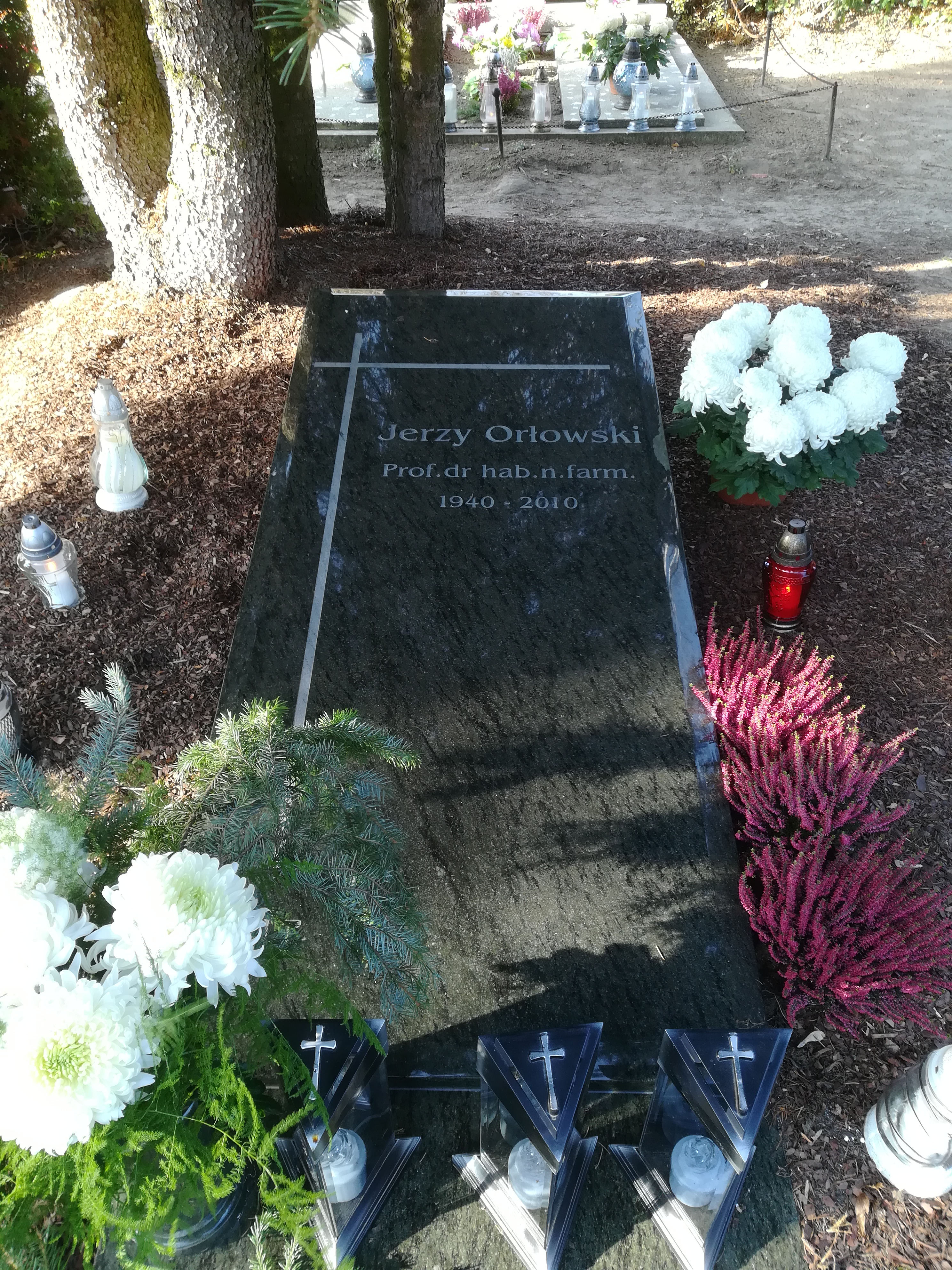 Grób Jerzego Orłowskiego na cm. junikowskim w Poznaniu.